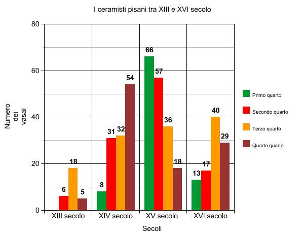 Il grafico mostra l'andamento del numero degli artigiani legati alla ceramica presenti a Pisa tra il XIII e il XVI secolo. Questo è stato creato sulla base di ricerche condotte principalmente da Liana Tongiorgi, Daniela Stiaffini e Giuseppe Clemente sulla documentazione archivistica del catasto pisano e fiorentino.